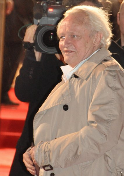 Niels Arestrup à la cérémonie des César